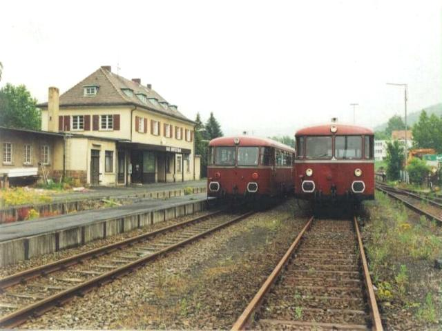 Zugkreuzung in Bad Brückenau mit VT 798 der OEF e.V. während Sonderfahrt